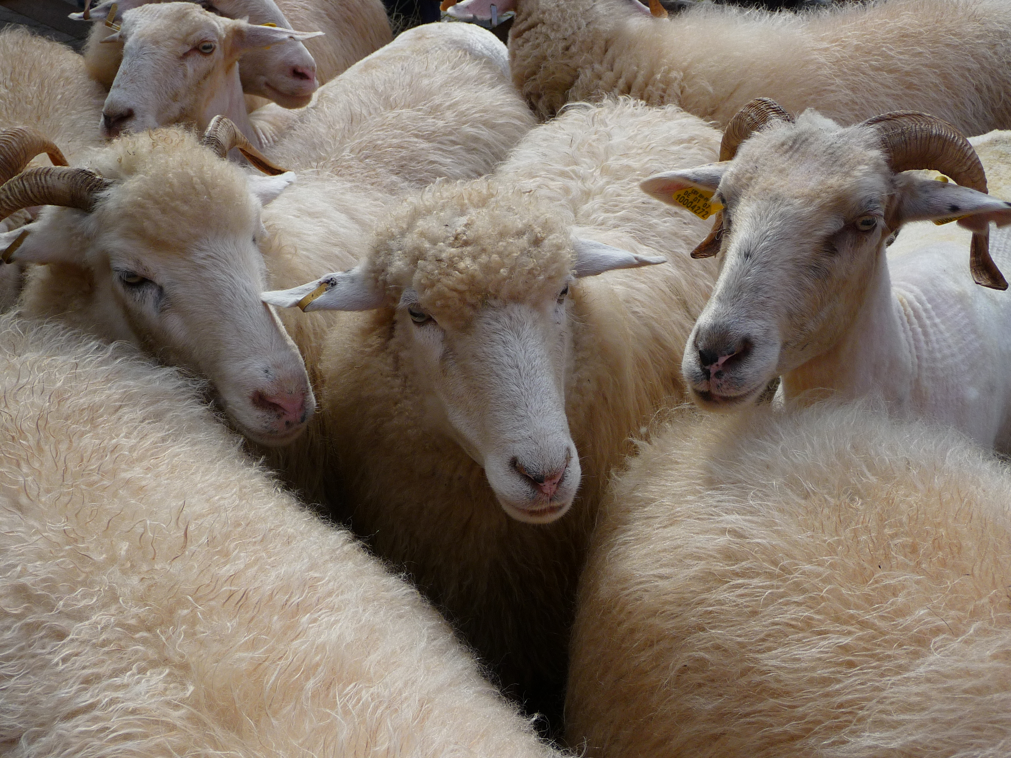 Waldschafe (Ovis orientalis f. aries) auf Bauernmarkt in Speyer (einige Tiere sind geschoren)